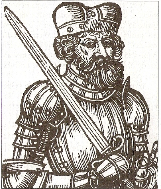 Rycina z XVII w.